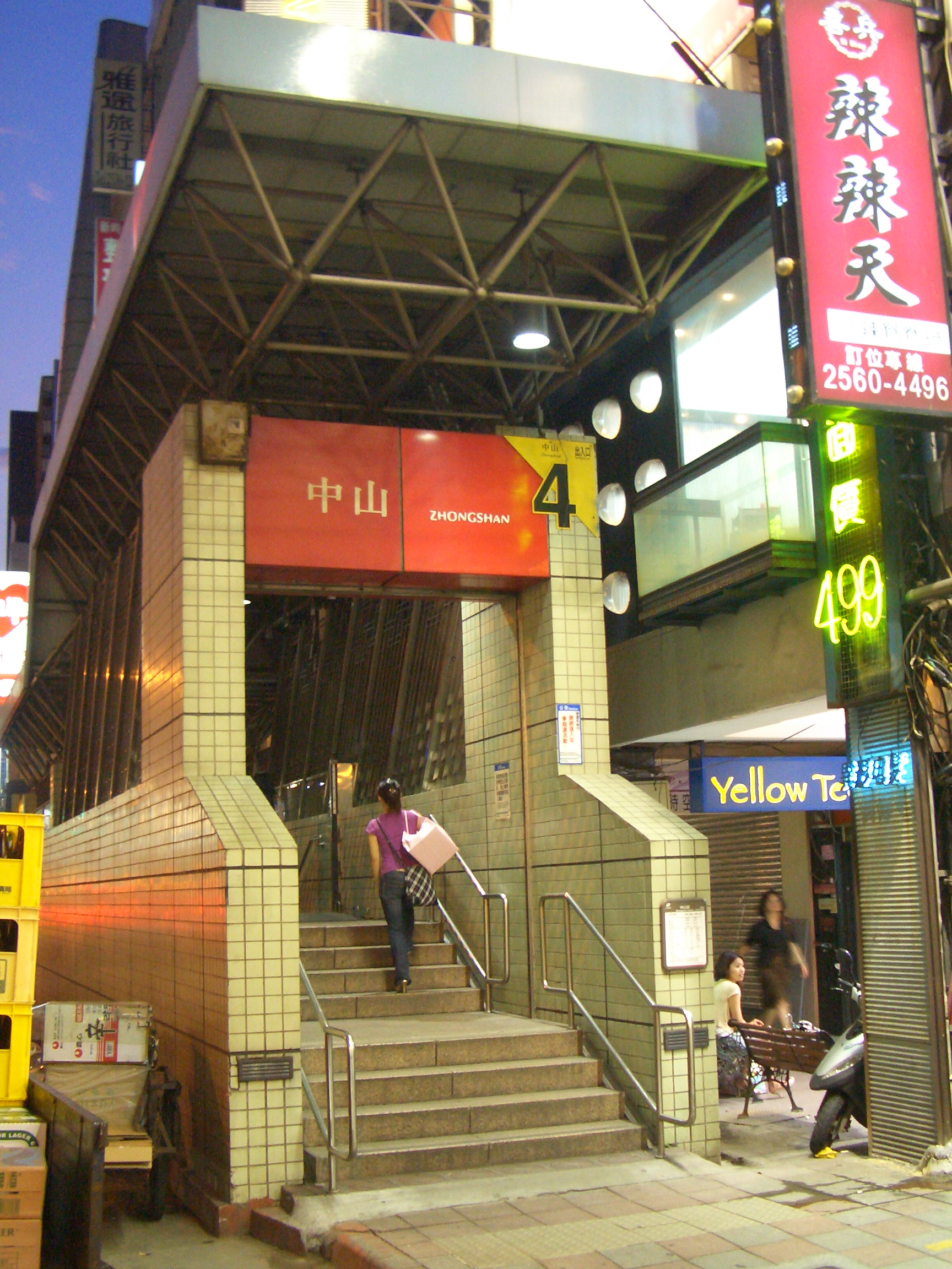 台北捷運中山站4號出口夜景。